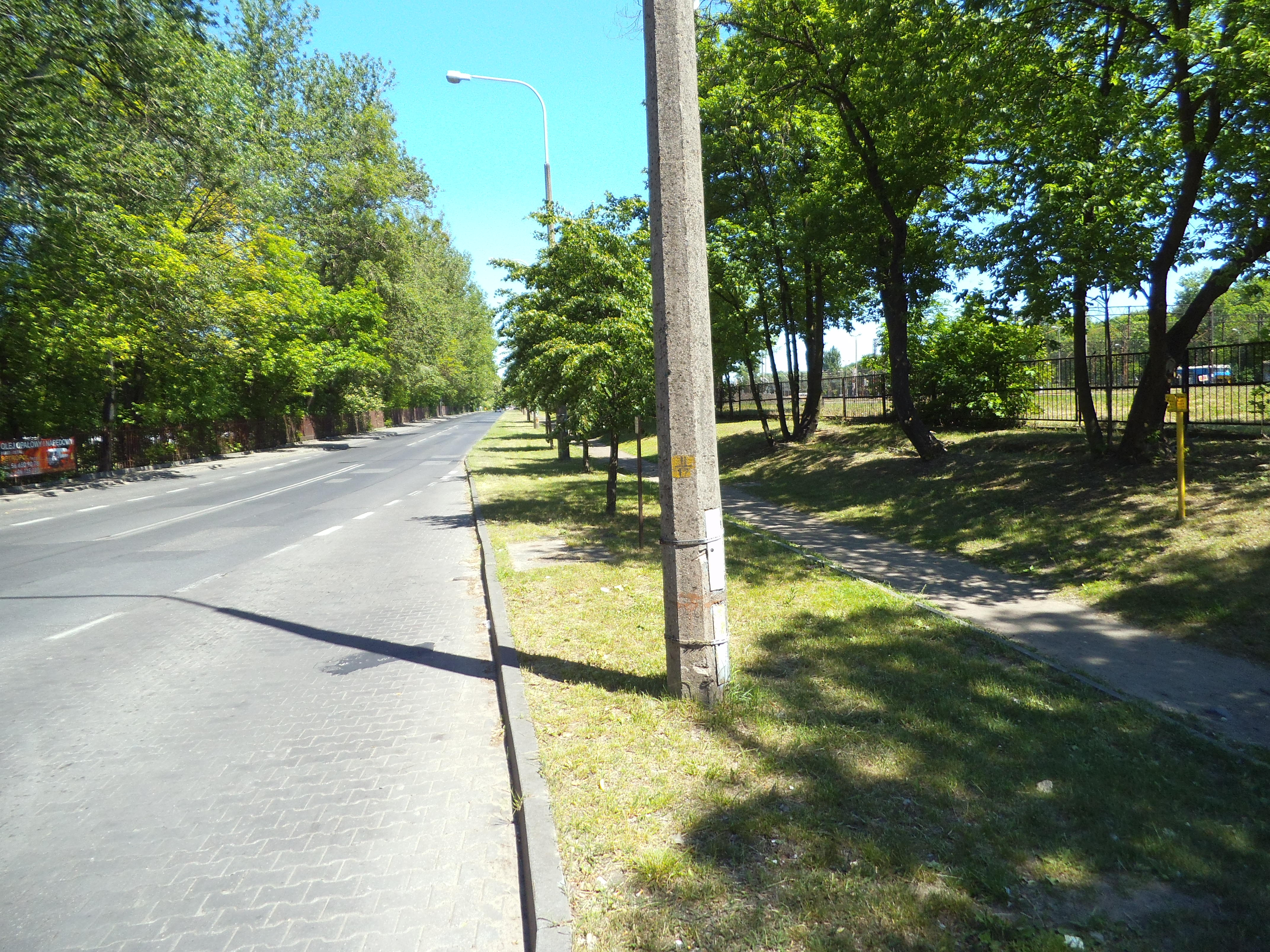 Fragment ulicy Kujawskiej w Toruniu